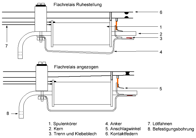 Zeichung vom Fernmelde Flachrelais